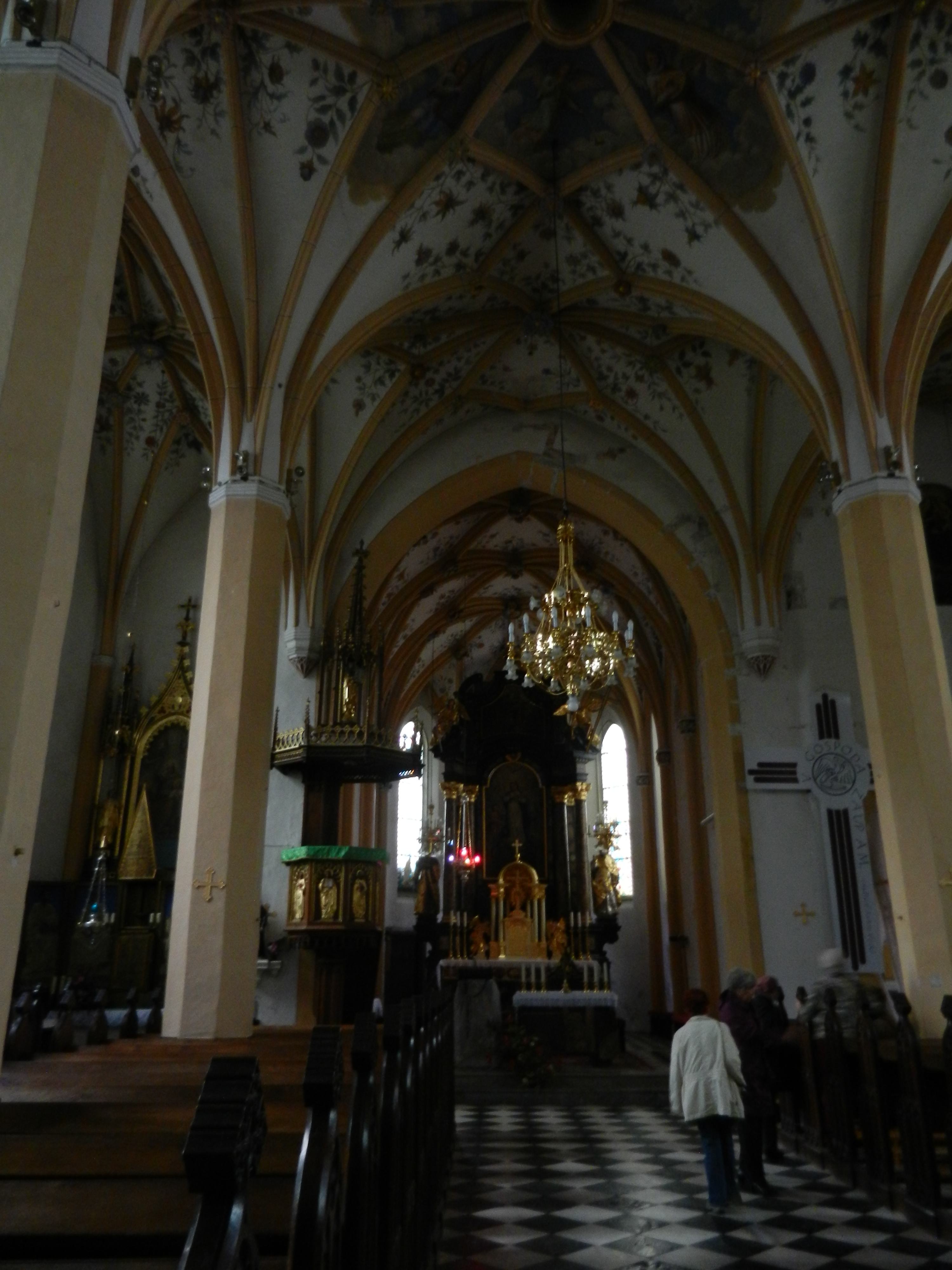 Notranjost cerkve svetega Petra v Radovljici, Slovenija.